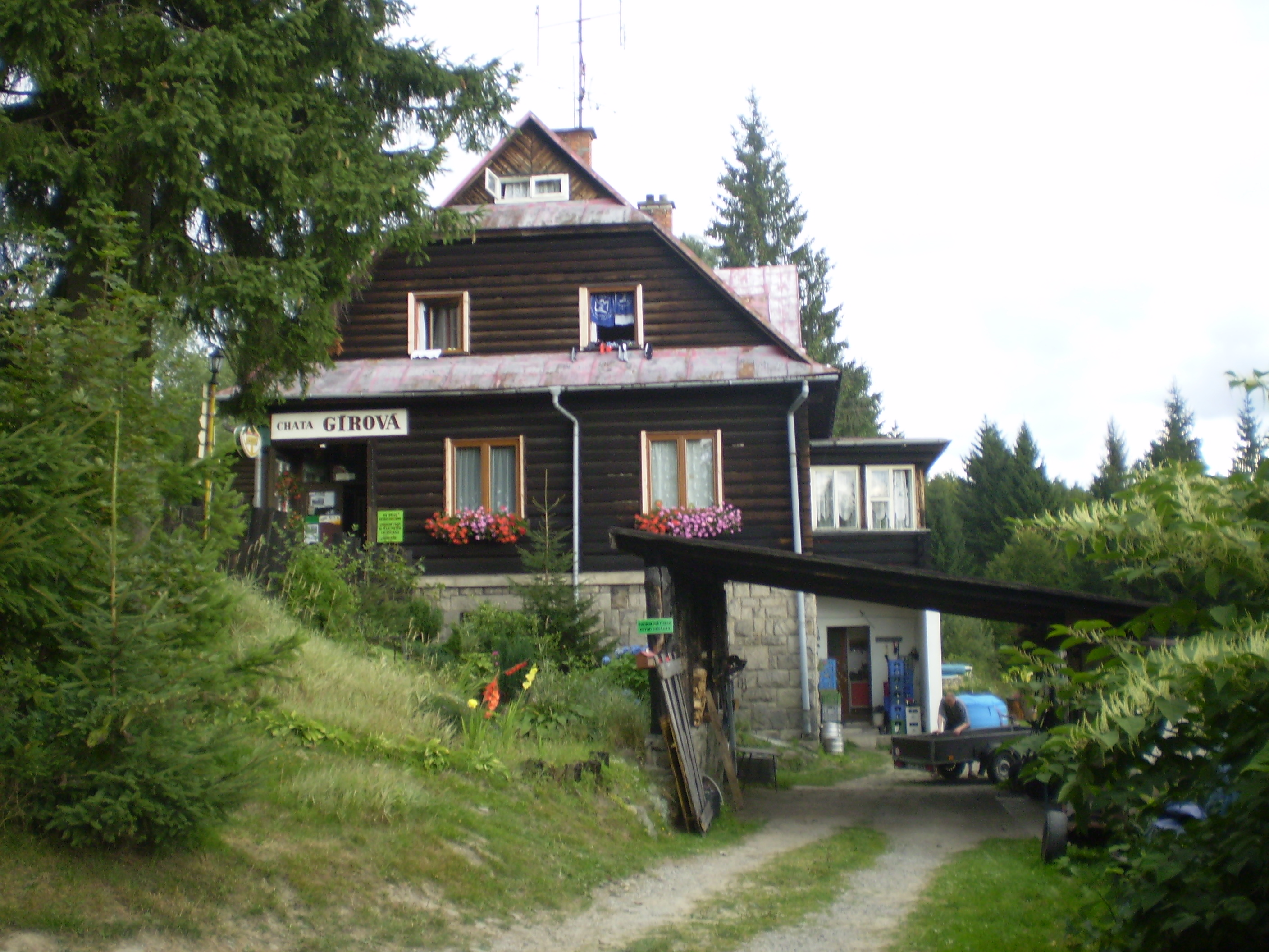 Chata Gírová v Beskydech.